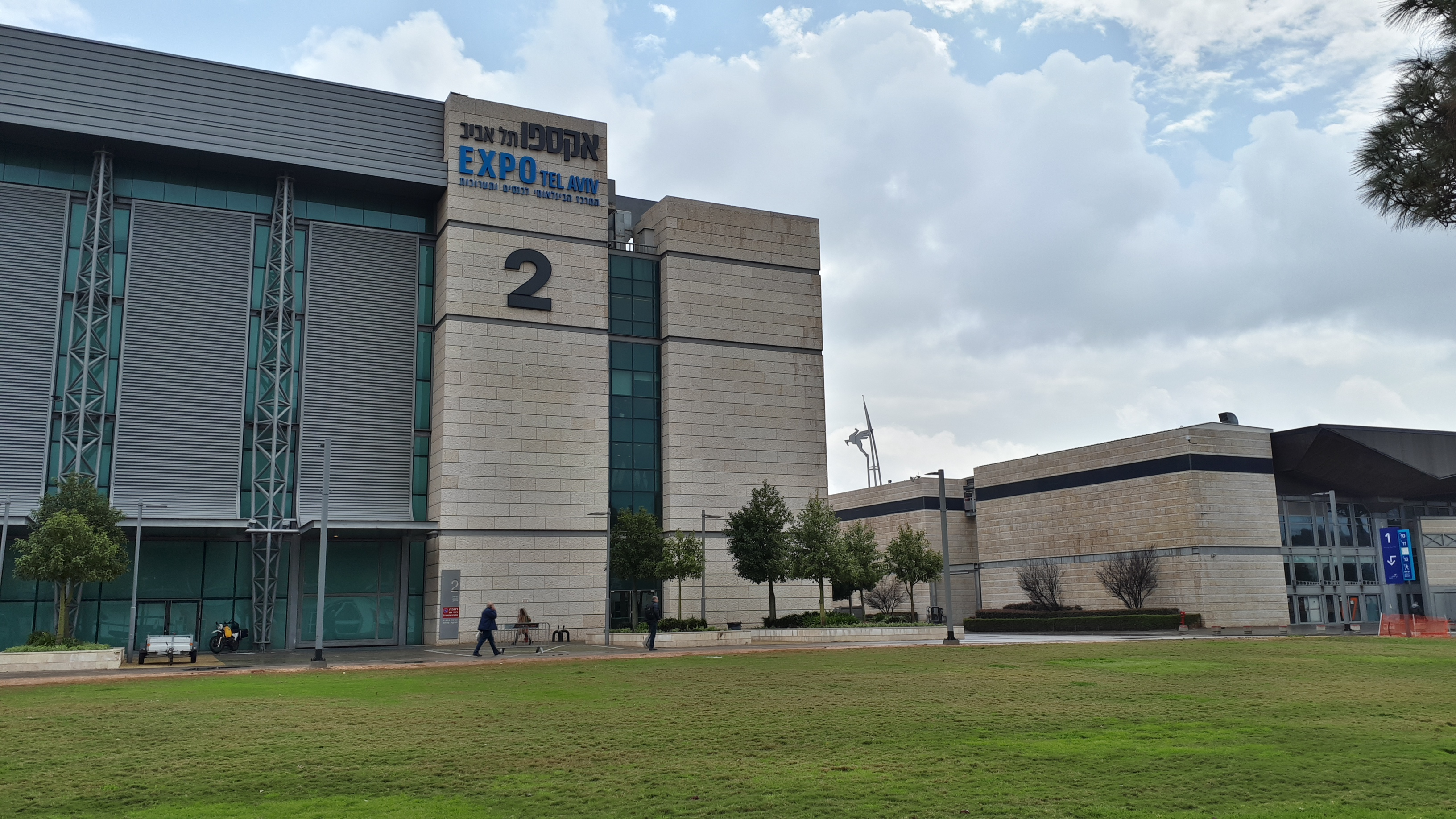 ביתן 2, גני התערוכה, תל אביב, פברואר 2019